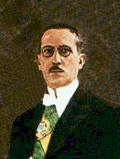 Artur da Silva Bernardes foi o 12º presidente do Brasil (1922-1926).